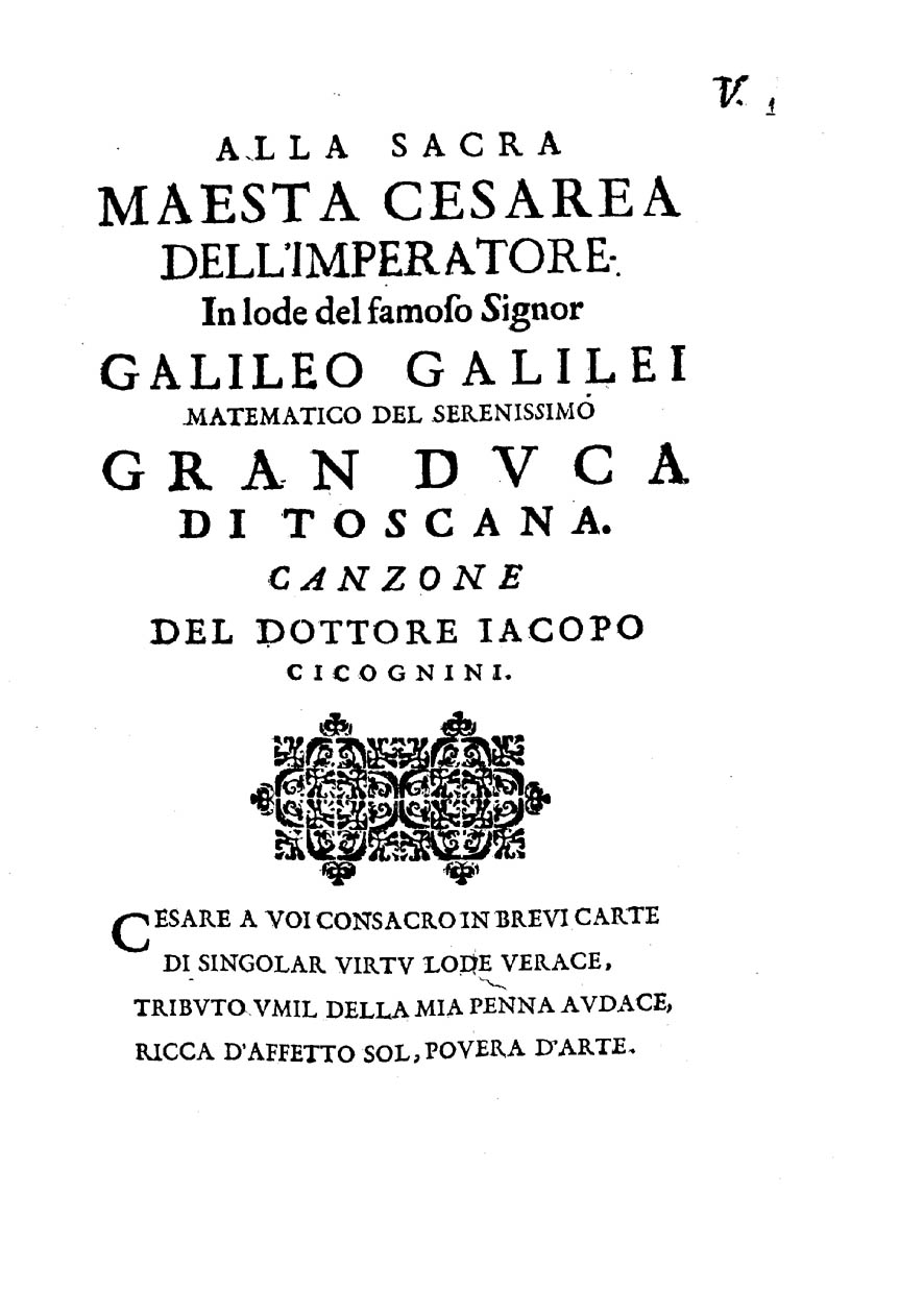 Alla sacra maestà cesarea in lode del famoso signor Galileo Galilei matematico del serenissimo gran duca di Toscana. Canzone del dottore Iacopo Cicognini. - [S.l.] : [s.n.], [s.d.] (In Firenze : nella stamperia di Gio. Batista Landini, 1631). - 8 p. ; 4º .